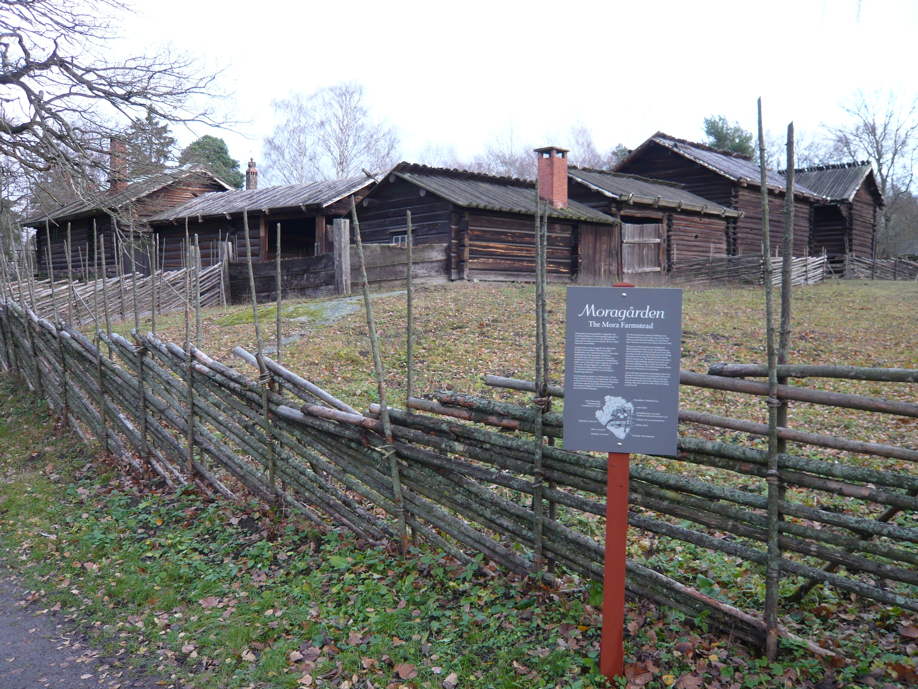 Cabañas no parque Skansen (Djurgården) en Estocolmo, Decembro 2007